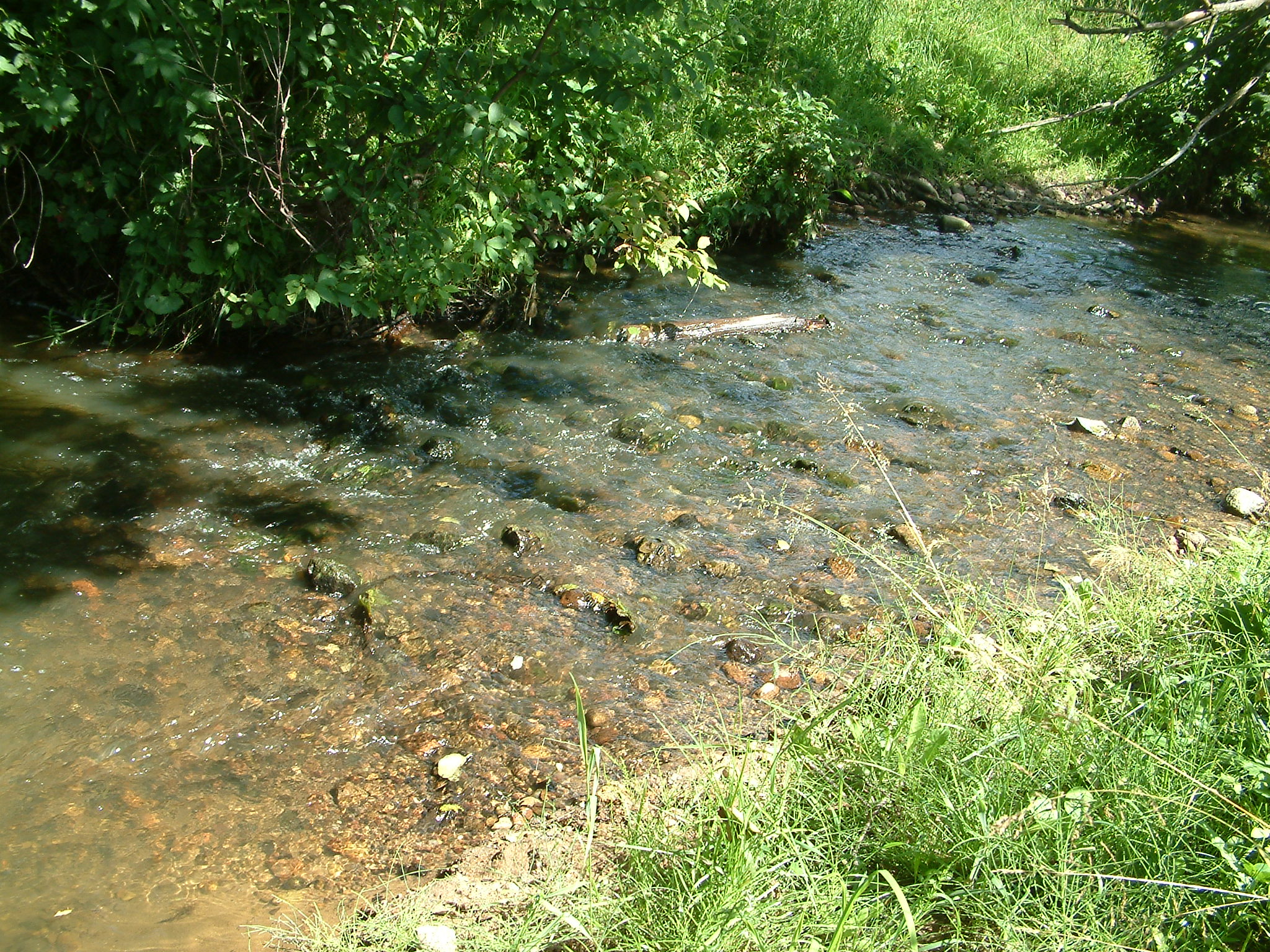 р. Уса, д. Слободка, Столбцовского р-на Минской области, Беларусь.